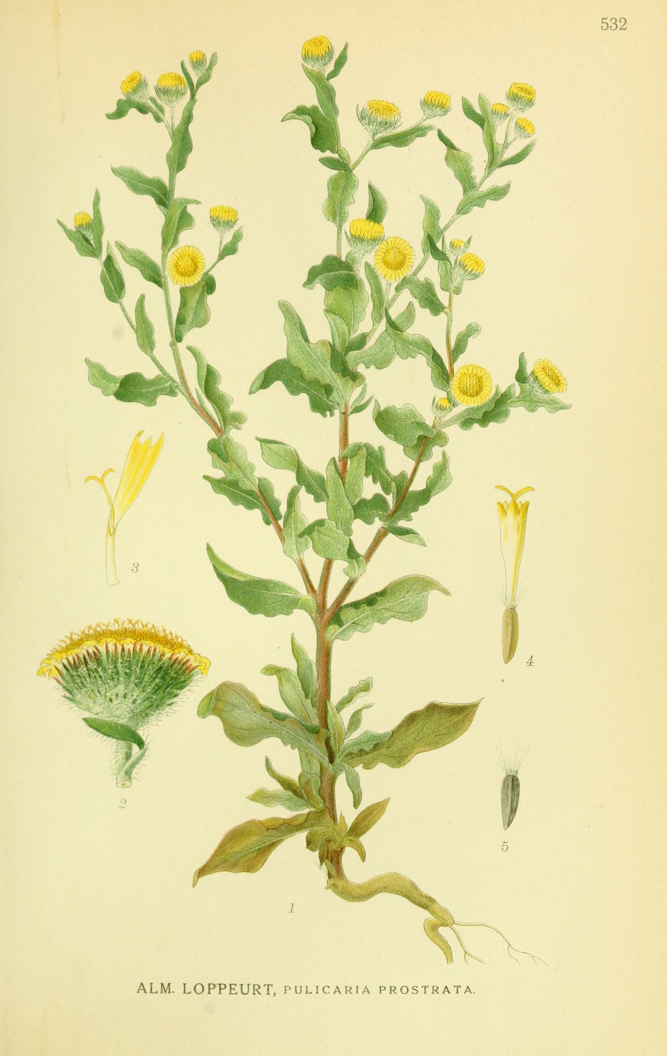 Legende: 1 Ganze Pflanze. 2 Körbchen (x3) 3 Strahlenblüte, Fruchtknoten entfernt (x8). 4 Röhrenblüte (x8). 5 Frucht (x8).